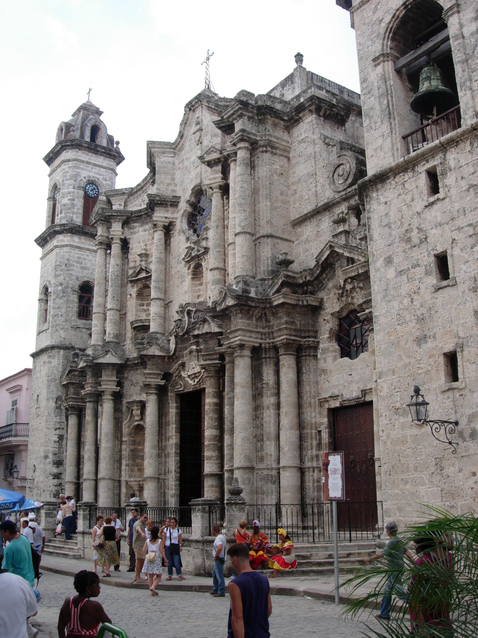 Catedral de la habana